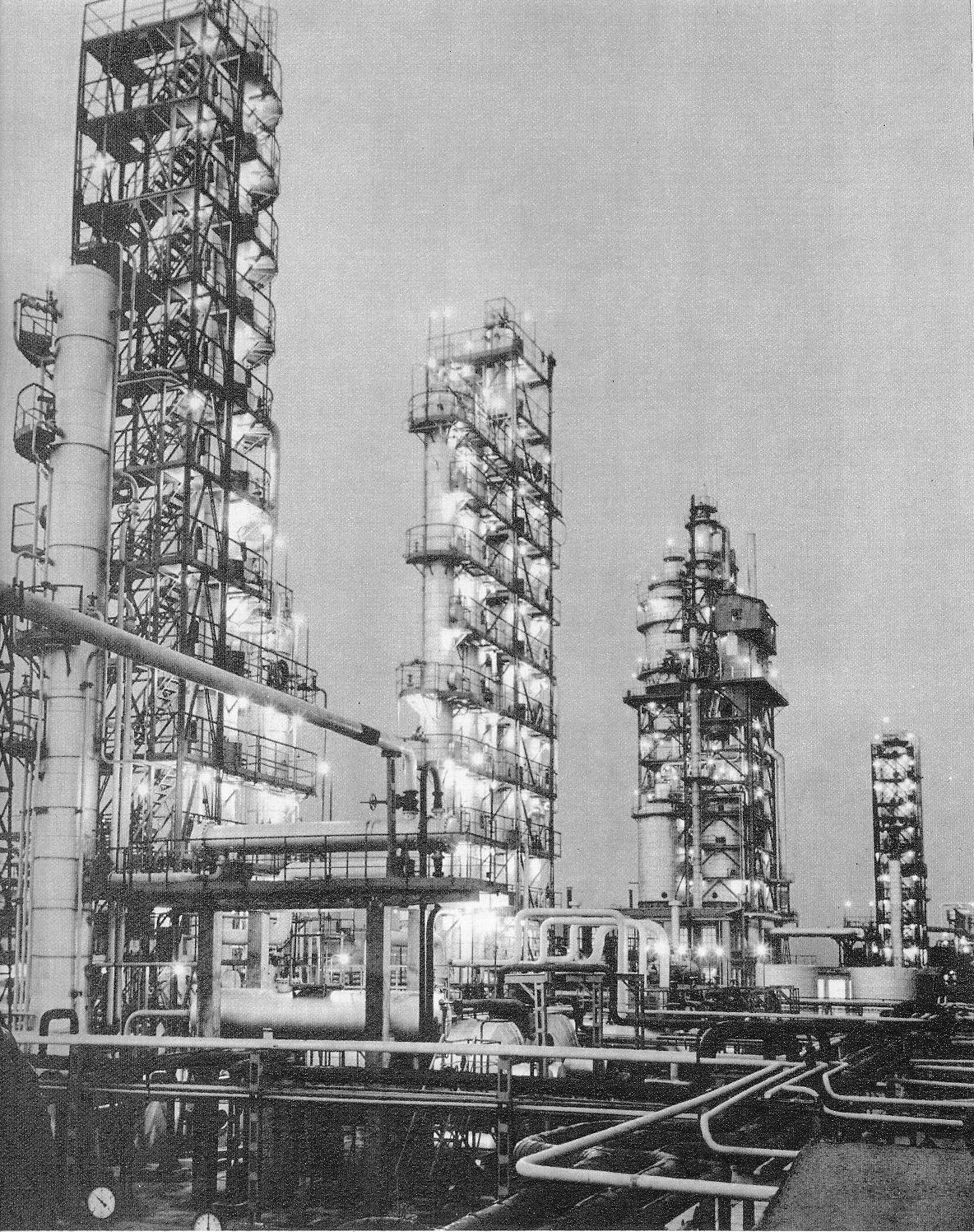 Rafinăria Oneşti în anul 1964.